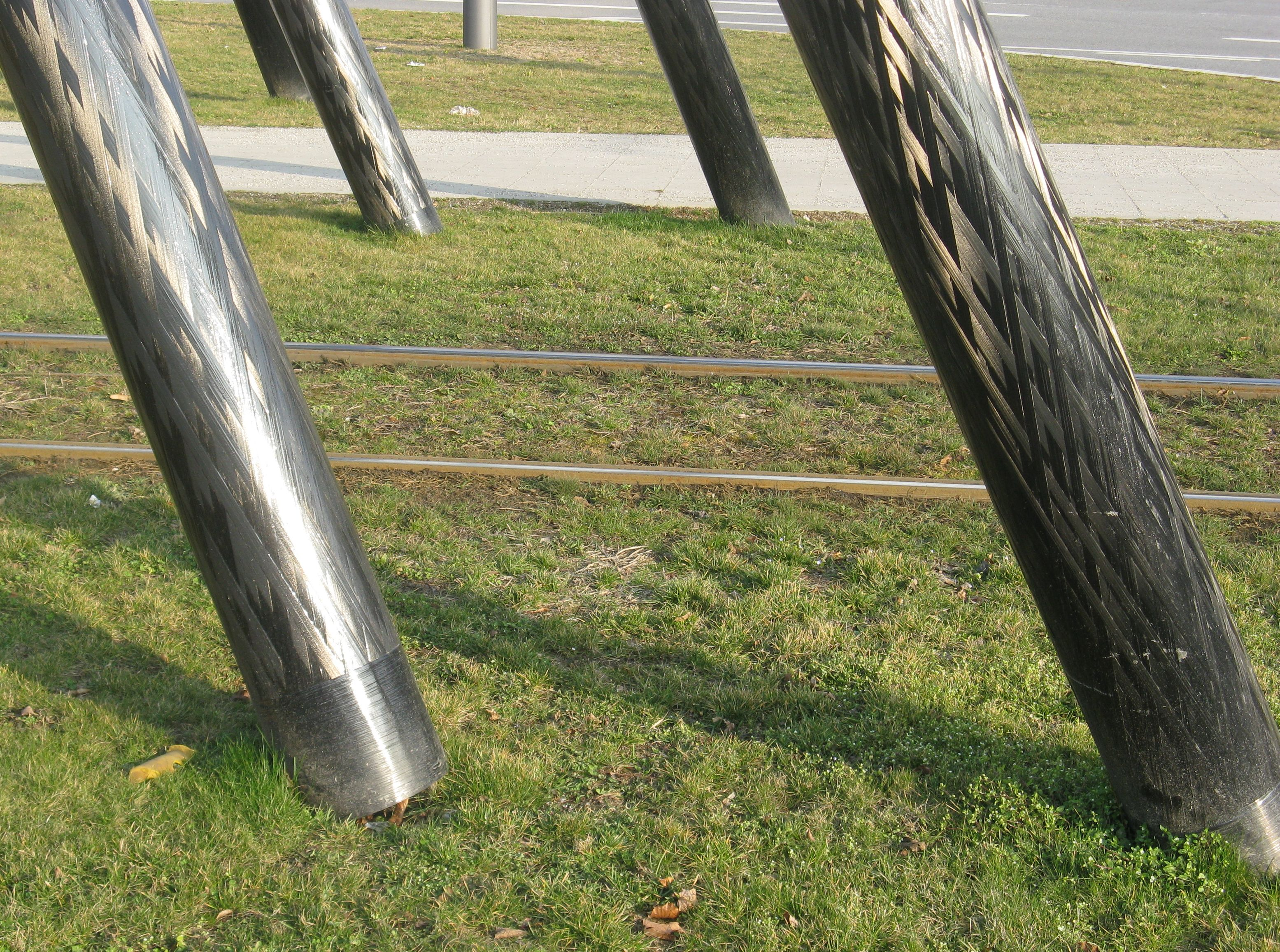 Mae West (Kunstwerk): Fundamente einiger der 32 Masten